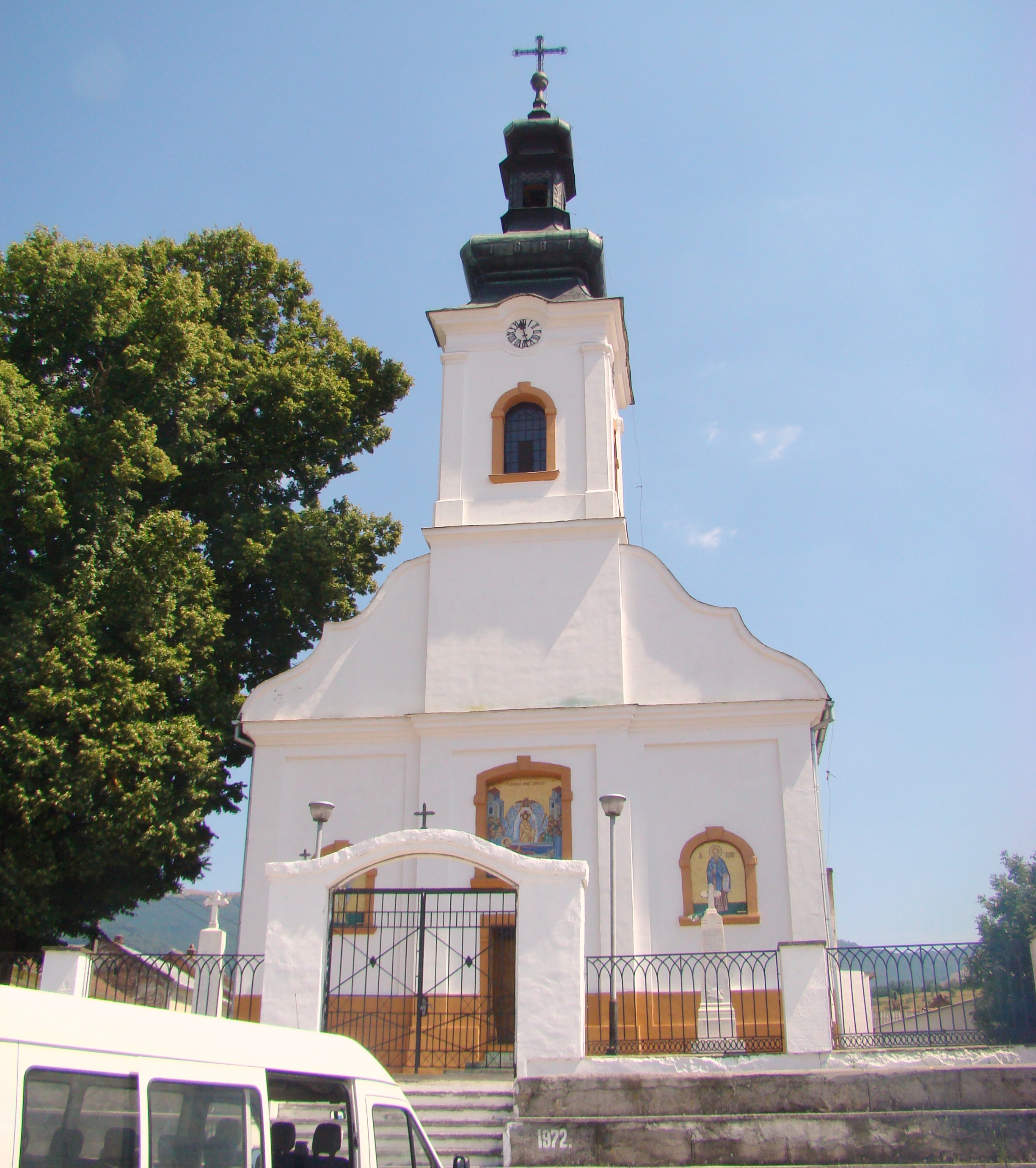 Biserica „Sfântul Atanasie”, sat Domașnea; comuna Domașnea